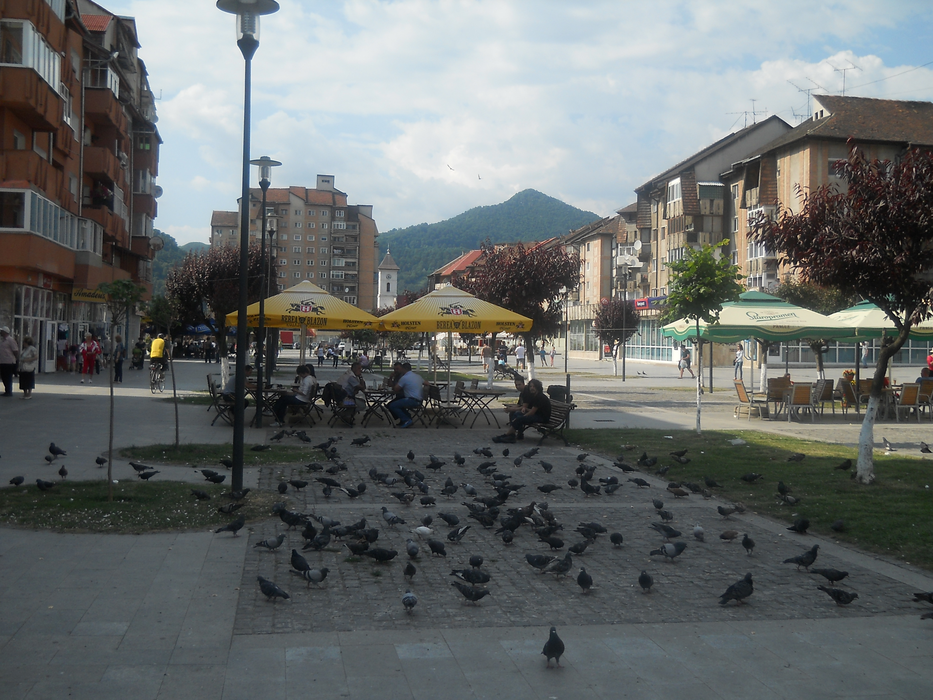 Stradă pietonală în Petroşani